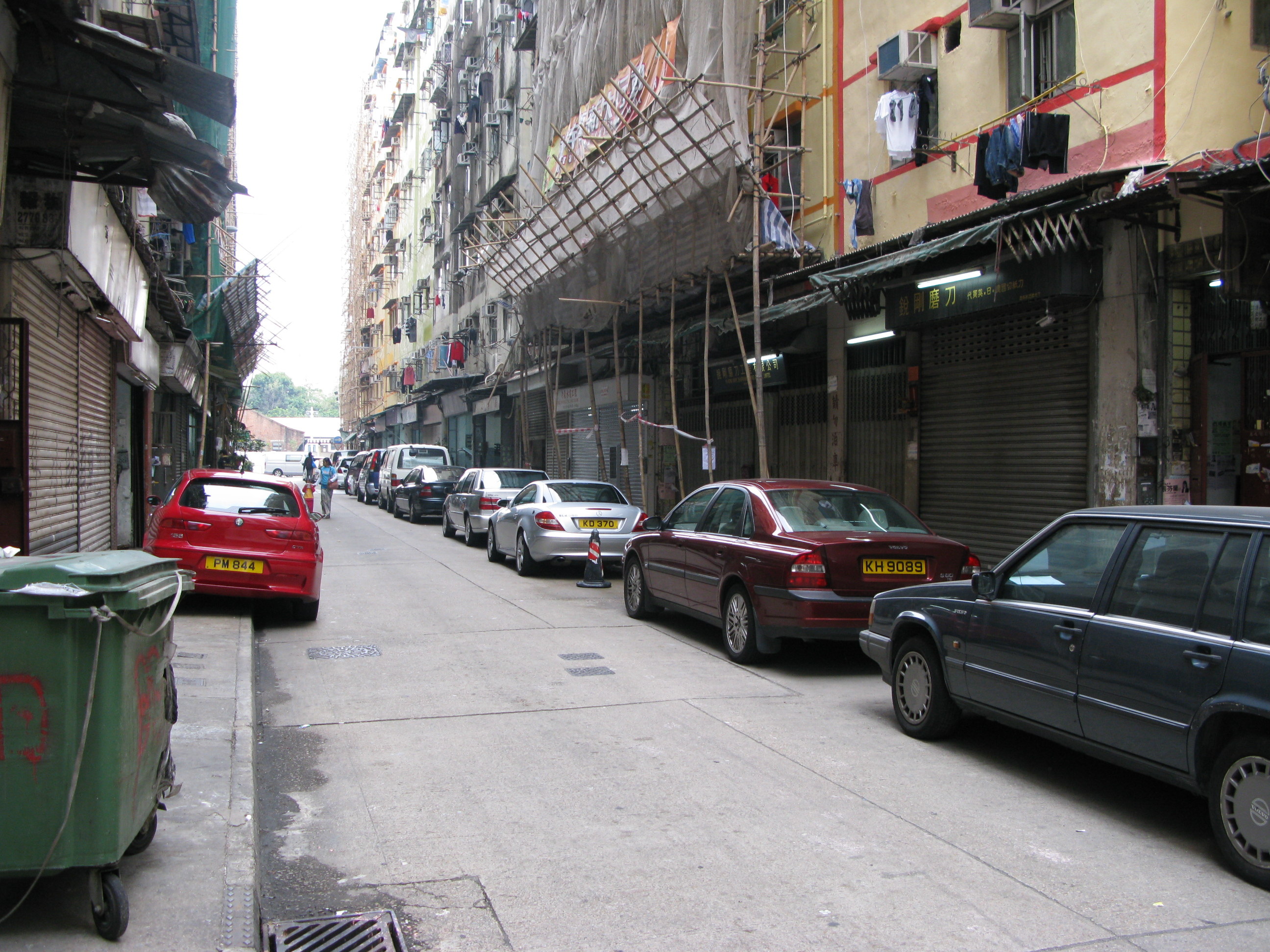 中文（香港）: 香港九龍土瓜灣十三街鹿鳴街